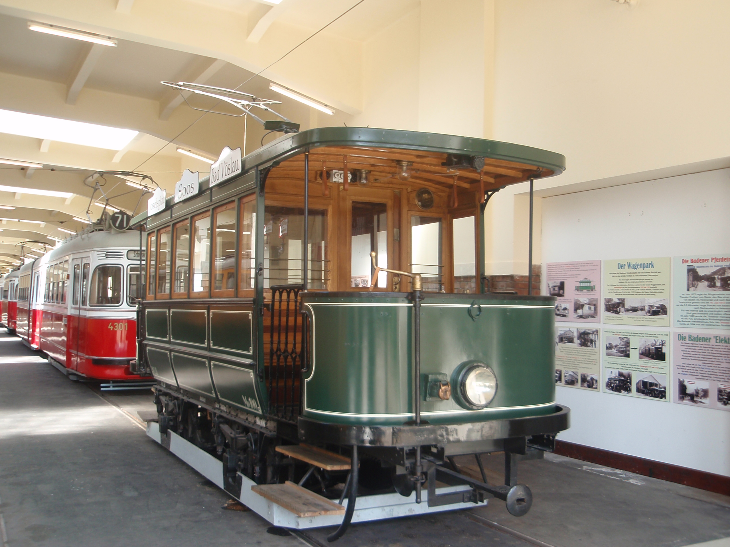 Wiener Straßenbahnmuseum